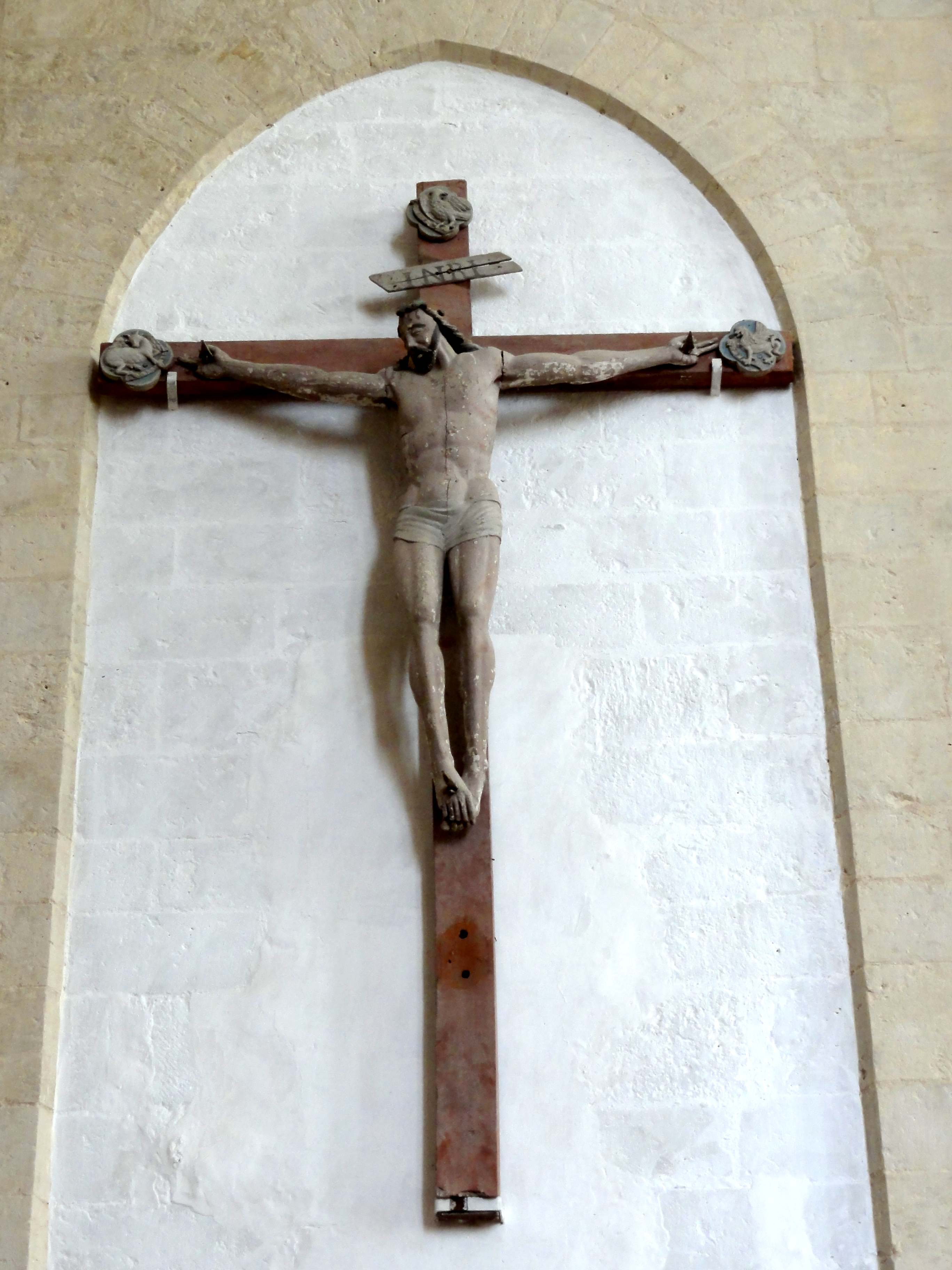 Mobilier de la basilique Saint-Mathurin de Larchant - voir titre.